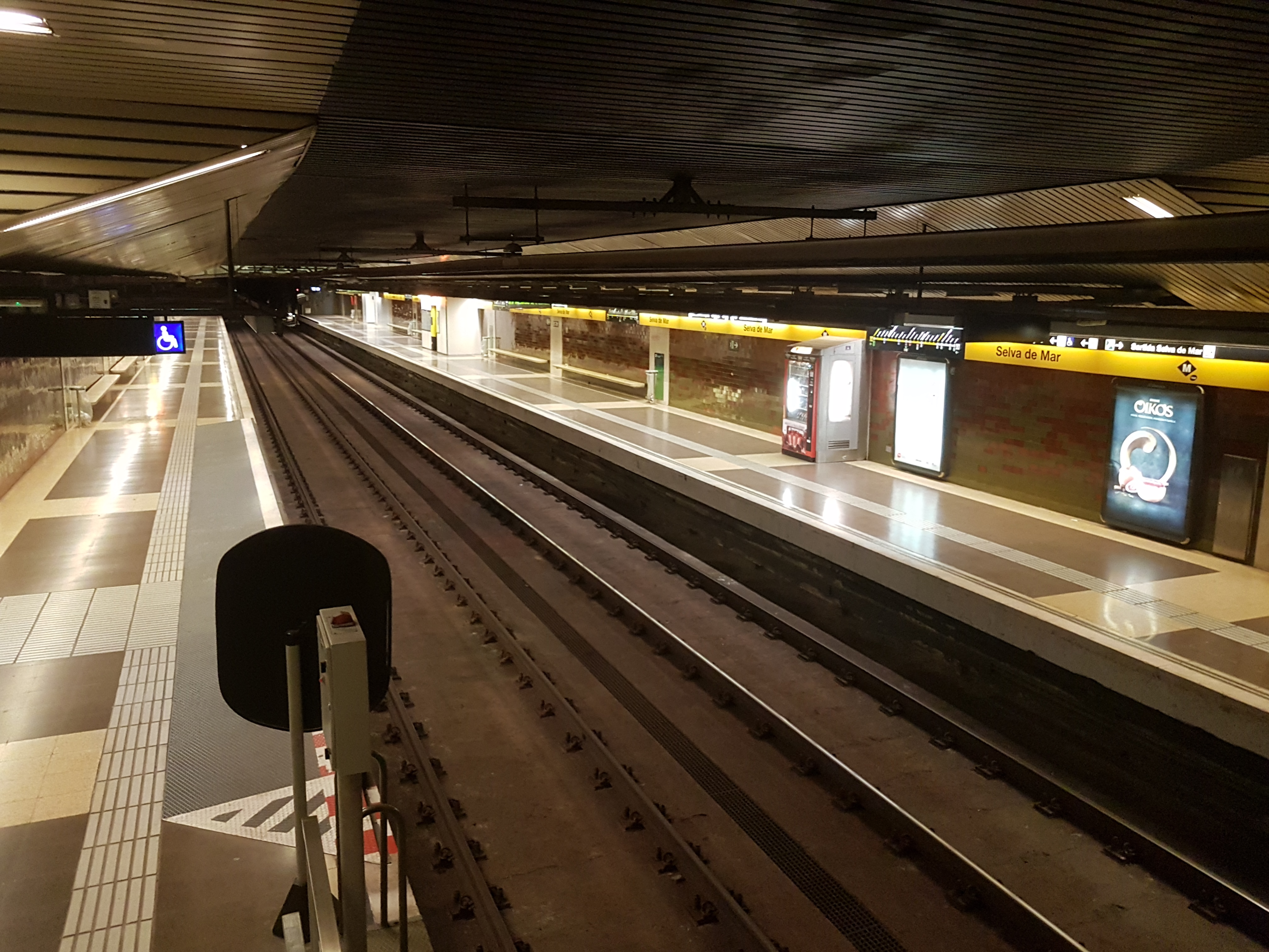 Estació de metro Selva de Mar de la L4 del metro de Barcelona